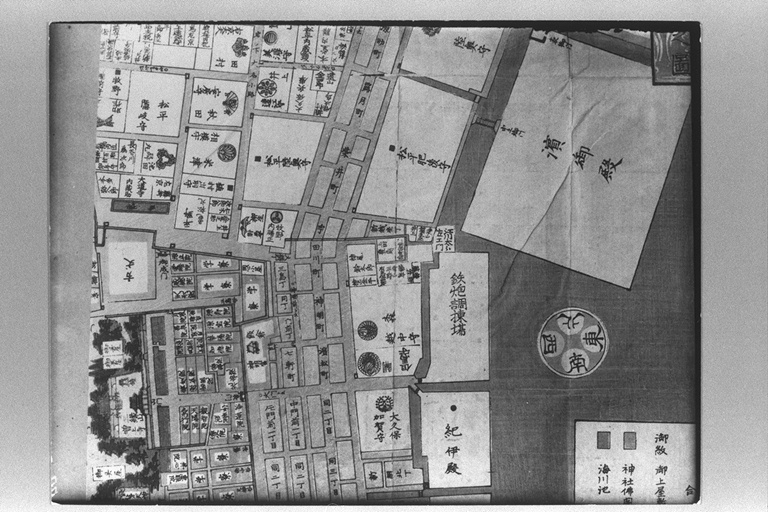 尾張屋清七版芝愛宕下絵図。図中央に有馬侶四郎の文字がある。築地鉄砲洲一帯は、外国人居留地に指定され塾も移転となる。福澤諭吉（３４才）は慶應３年（１８６７）暮、芝新錢座の有馬家中屋敷を買い取り、塾舎・自宅を造営する。翌４年４月移転完了を機に塾名を慶應義塾と定める。